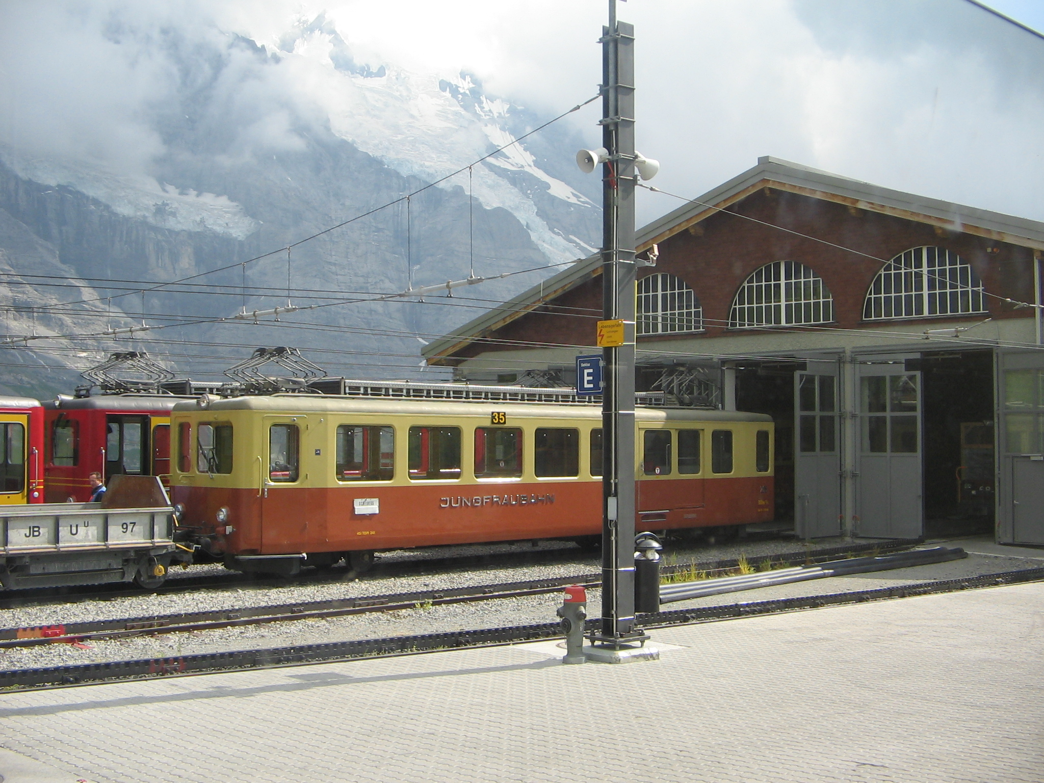 Jungfraubahn. Jungfrau Switzerland